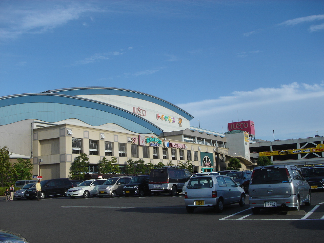 Masa21(Shopping mall,マーサ21),Gifu,Gifu,Japan(岐阜県岐阜市)で撮影